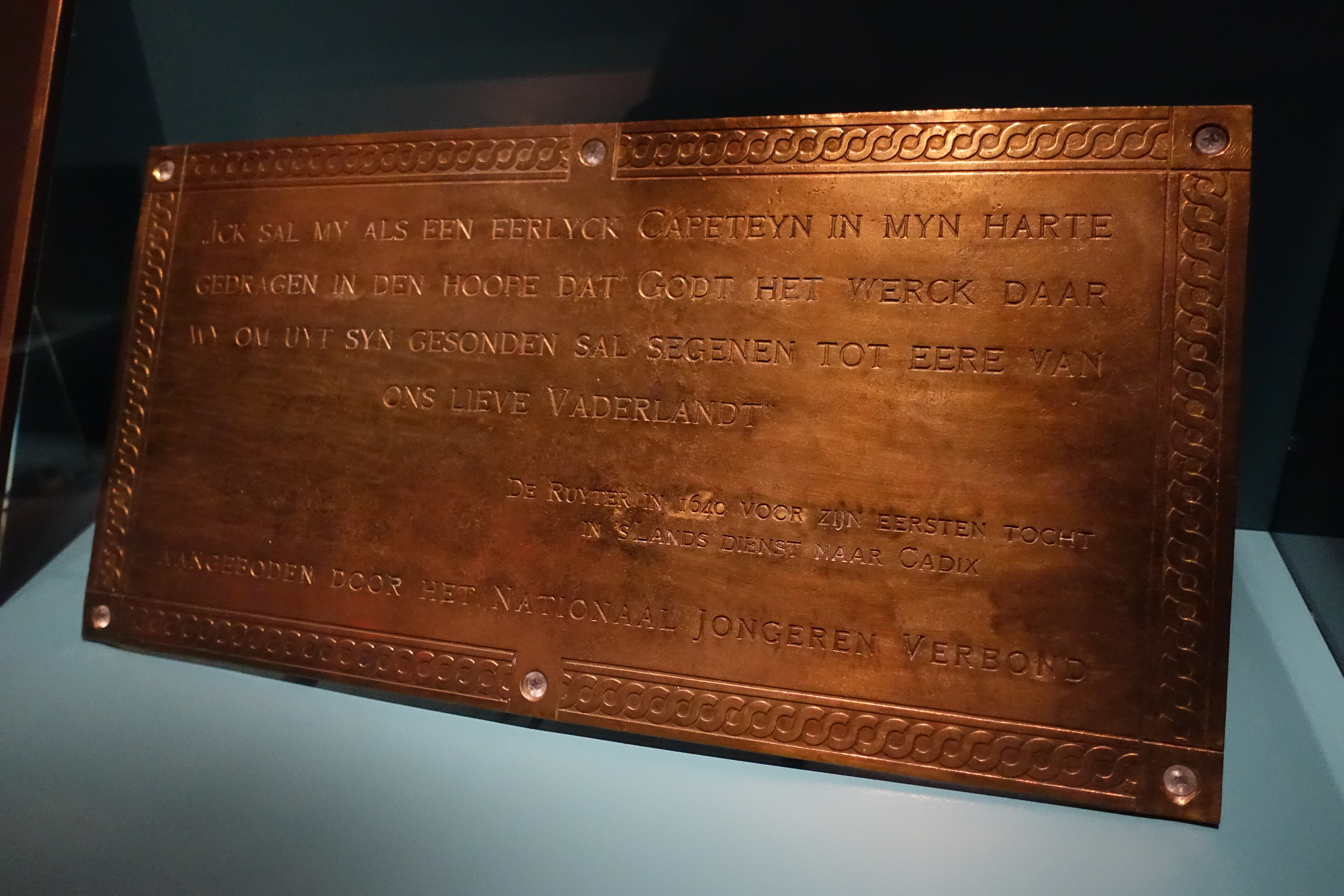 Plaquette met de belofte van Michiel de Ruyter, afkomstig uit het wrak van Hr.Ms. De Ruyter, gezonken bij Java. Foto genomen in het Marinemuseum Den Helder